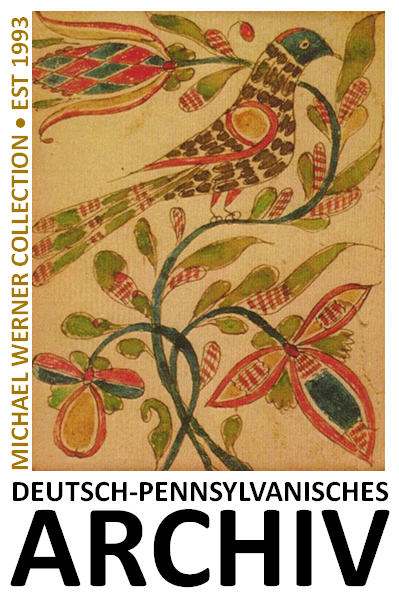 Deitsch: Logo Deutsch-Pennsylvanisches Archiv